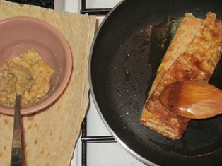 Զեյթունի յայլաներում պատրաստվող քաղցրեղեն